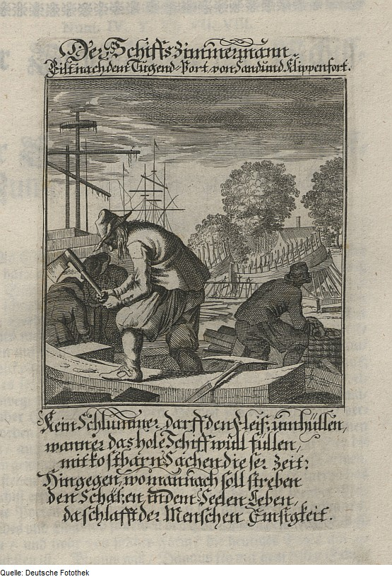 Original image description from the Deutsche Fotothek Ständebuch & Stand & Handwerk & Beruf & Zimmermann